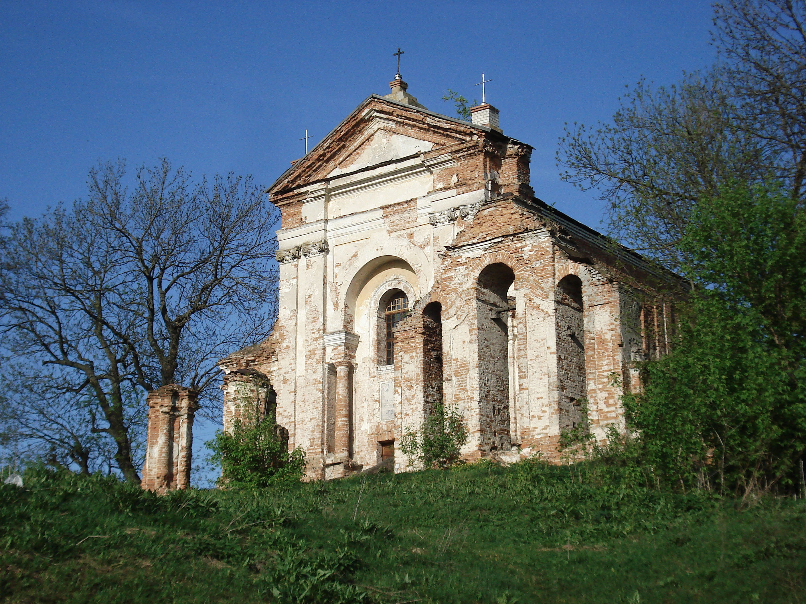 Костел Св.Антонія Падуанського (мур.), с.Стара Котельня